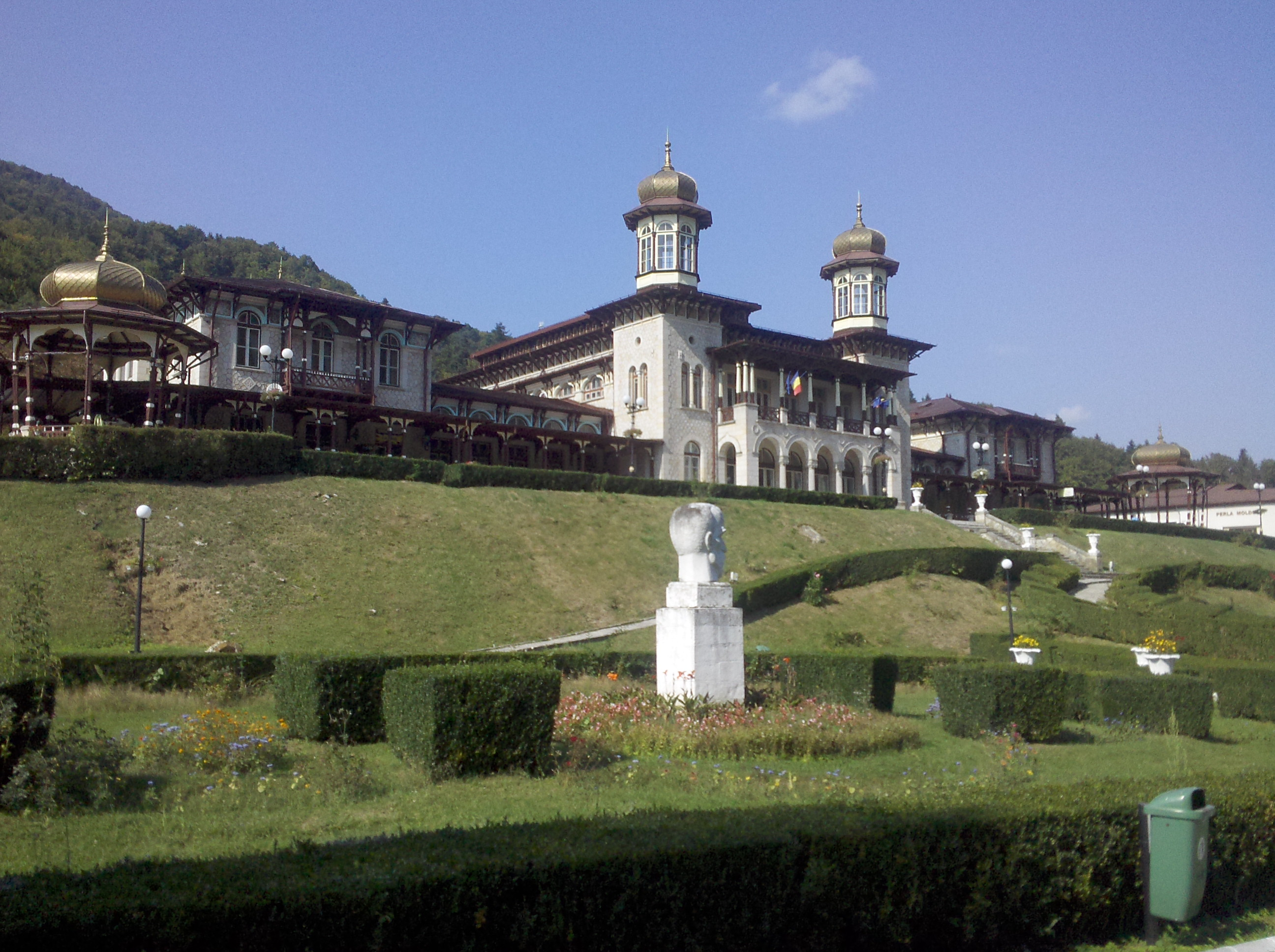 Parque y el edificio del antiguo casino en la ciudad rumana de Slănic Moldova